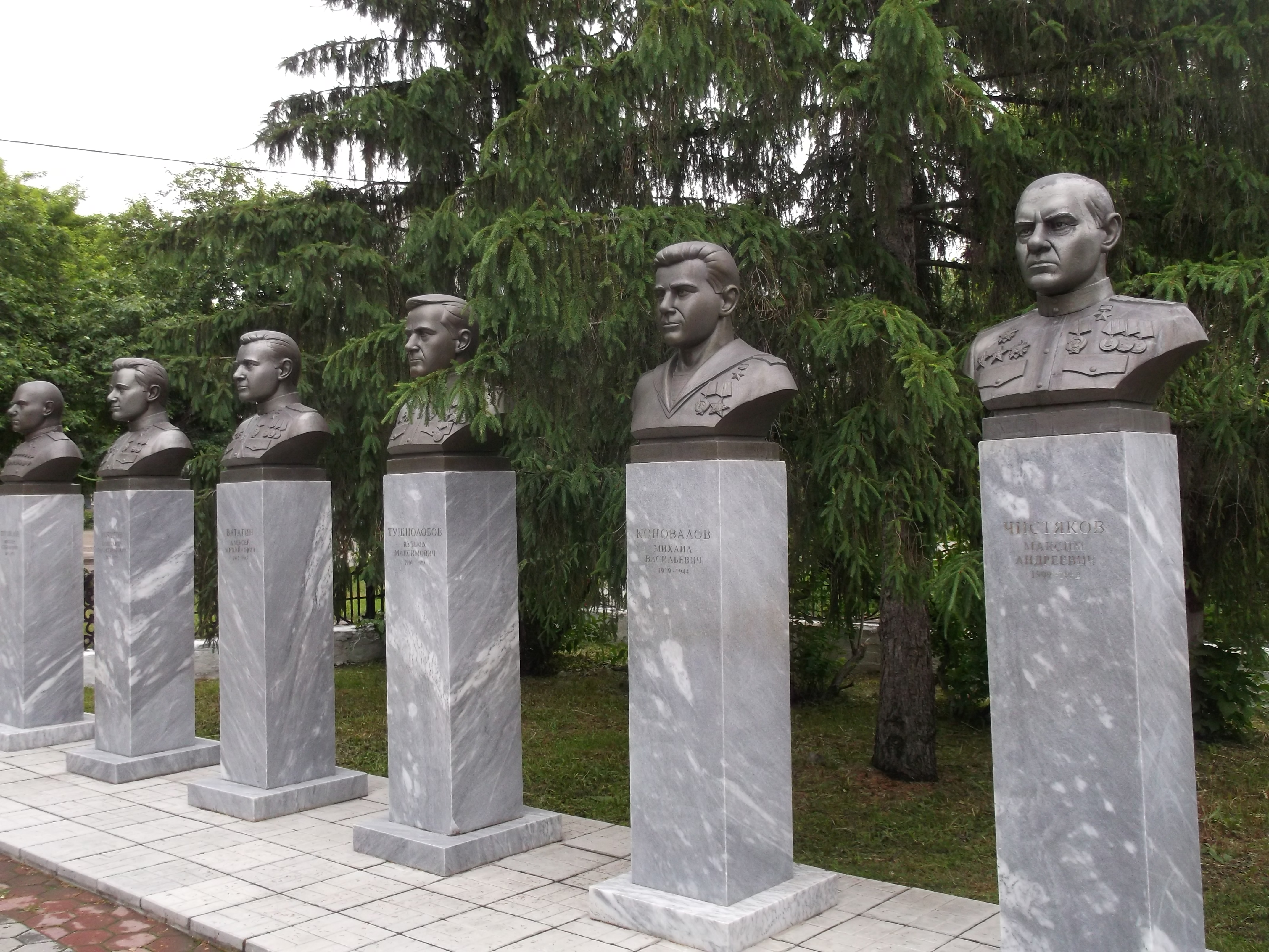 г. Катайск